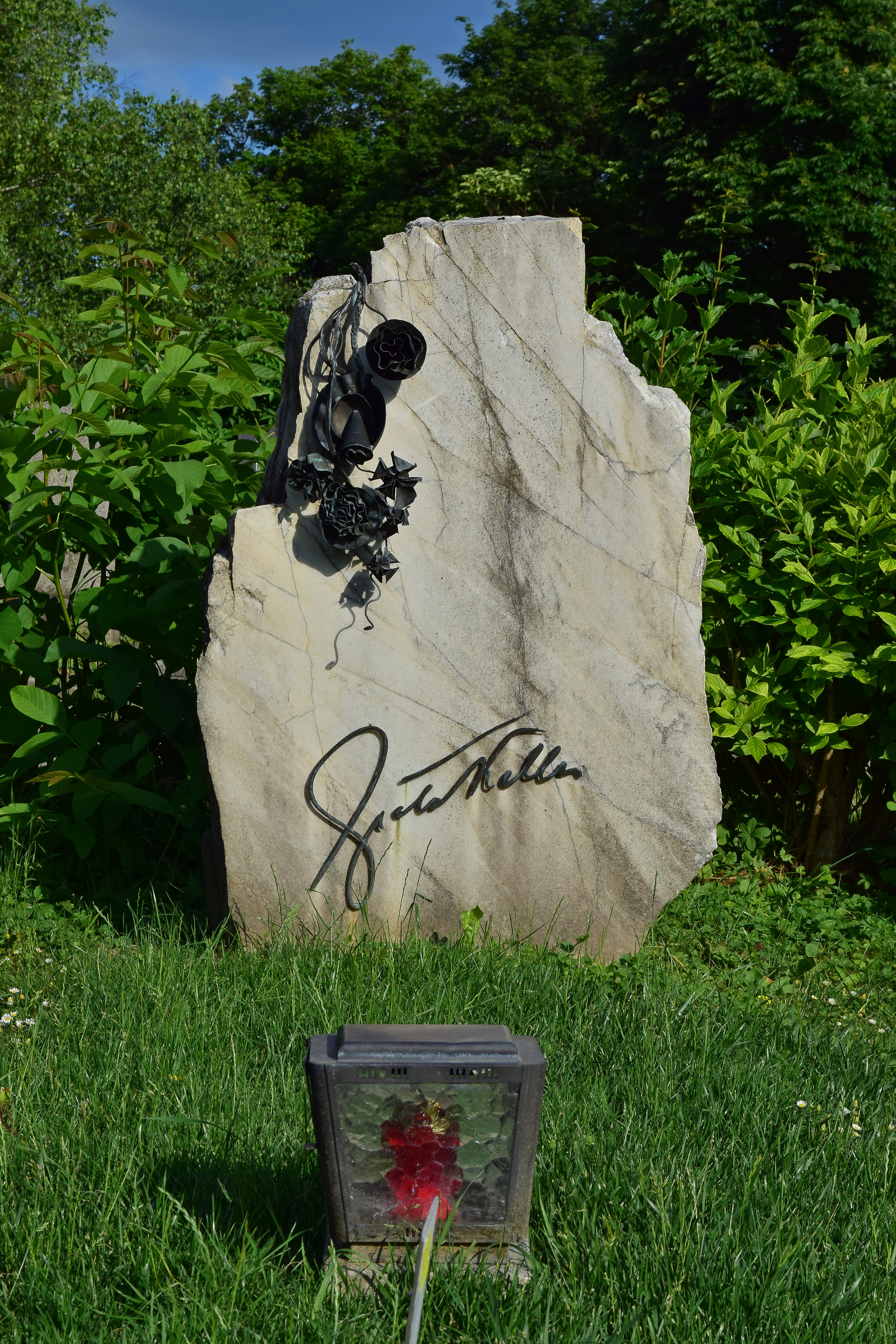 Ehrenhalber gewidmetes Grab von Greta Keller auf dem Wiener Zentralfriedhof, Gruppe 40.